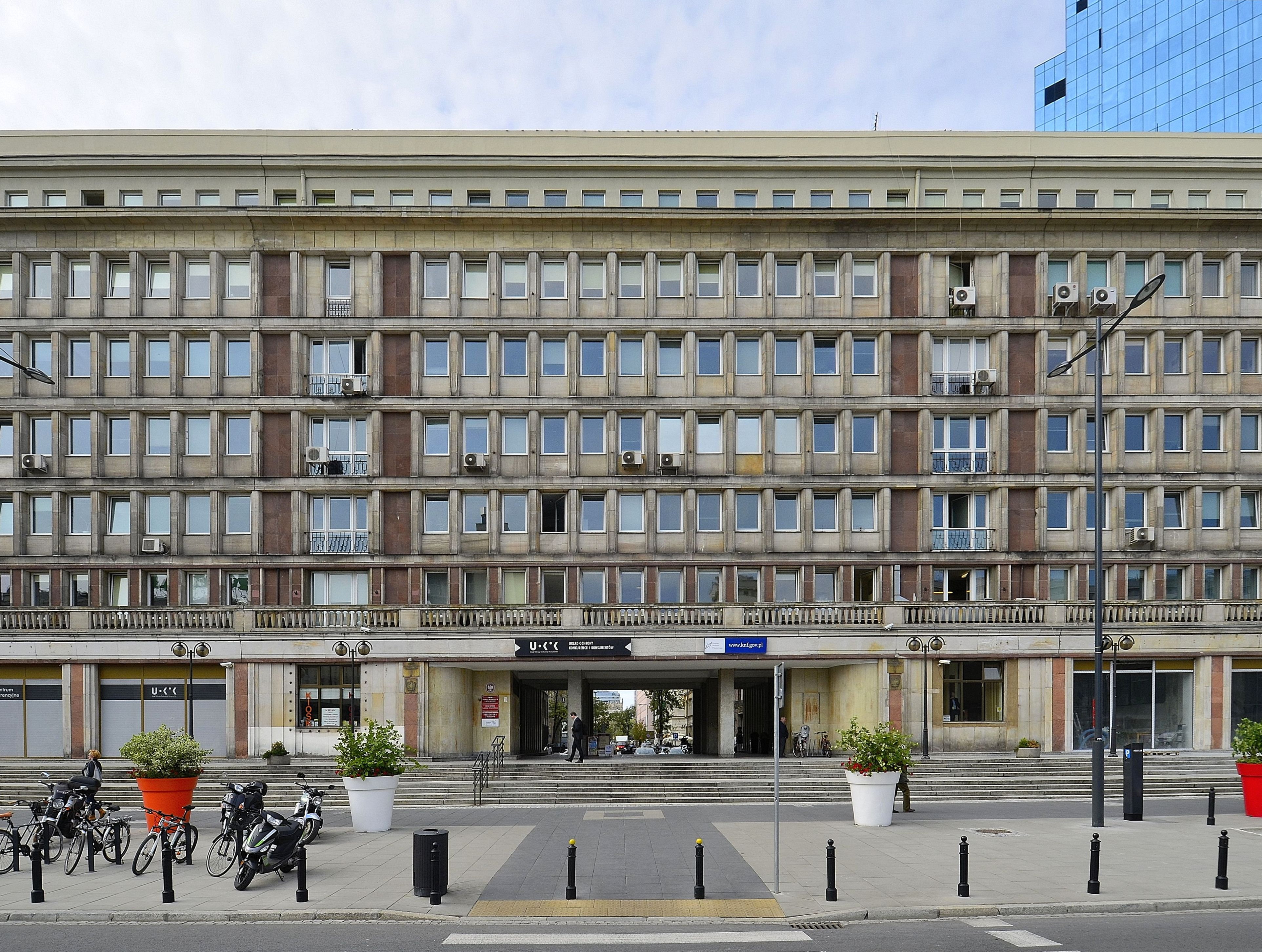 Siedziba UOKiK i KNF przy placu Placu Powstańców Warszawy 1